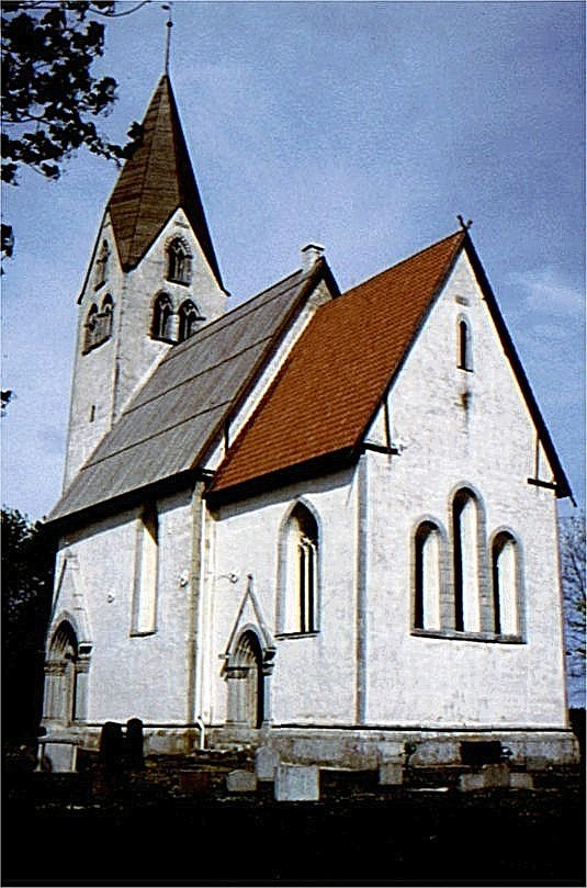 Ekeby kyrka, Gotland i Gotland, Sverige. Ekeby kirke